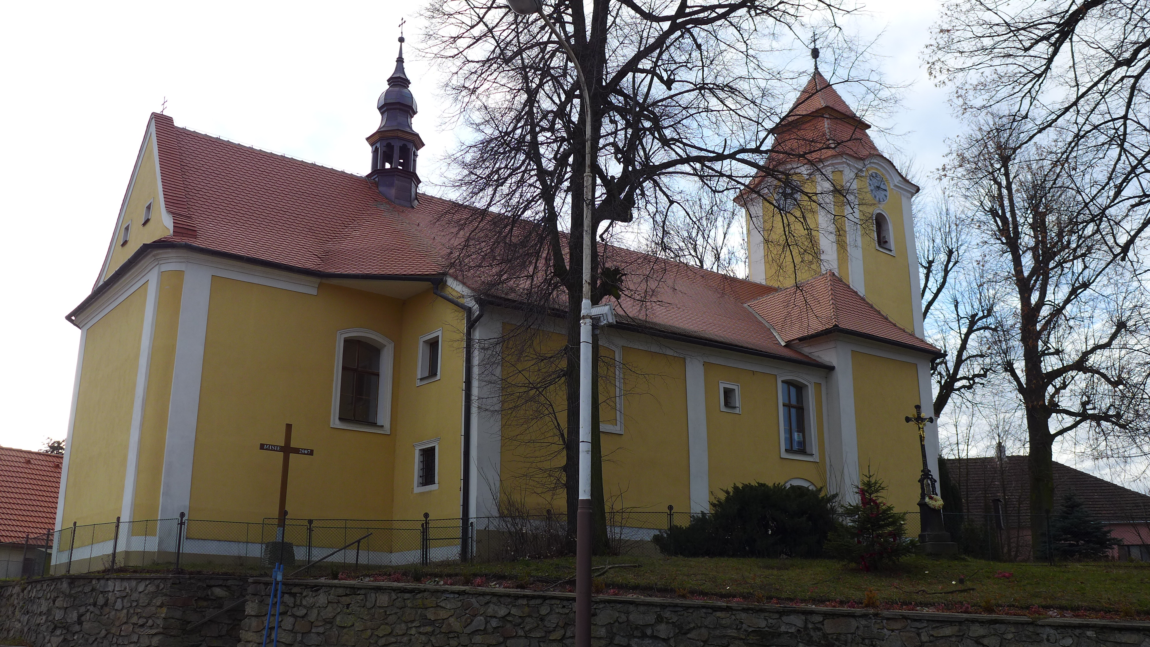 Kostel svatého Jana Křtitele (Rokytnice nad Rokytnou), Rokytnice nad Rokytnou